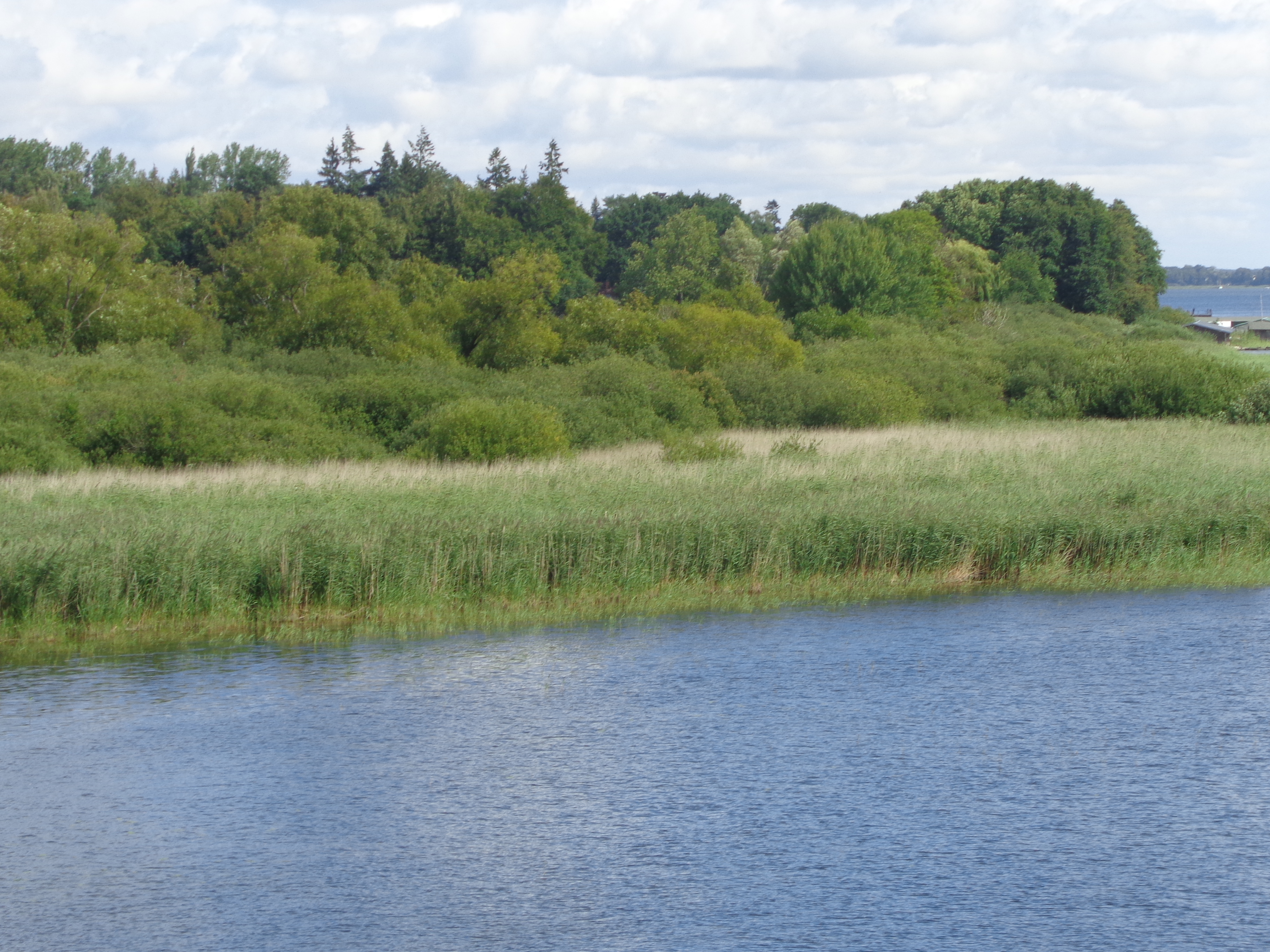 Schilf an der Metow in Plau am See